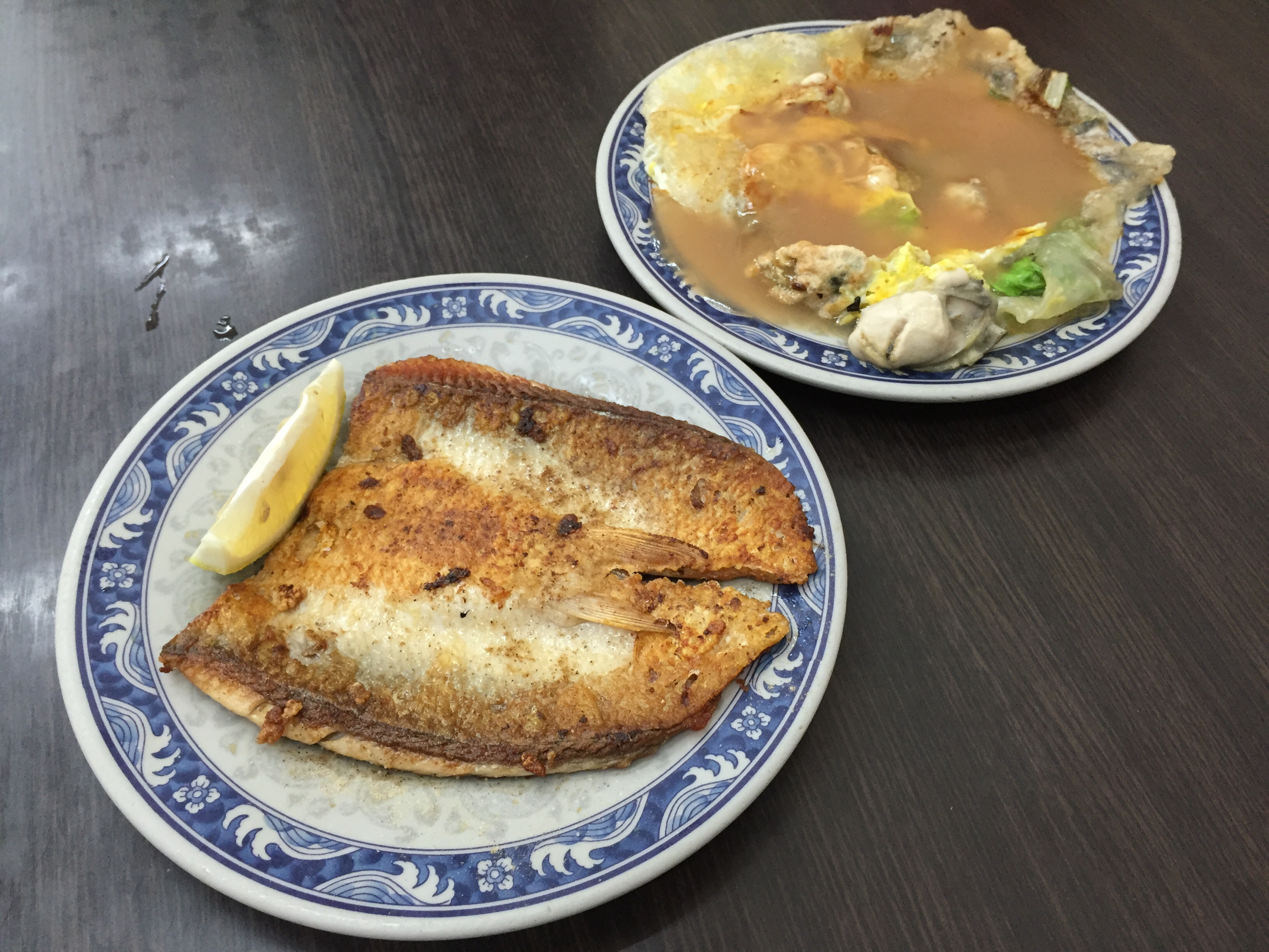 蚵仔煎, 煎虱目魚肚, 東石吳蚵仔煎小吃店, 南機場夜市, 台北